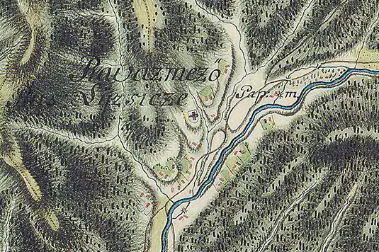 Карта Лисичева та Гамори - 1782 рік